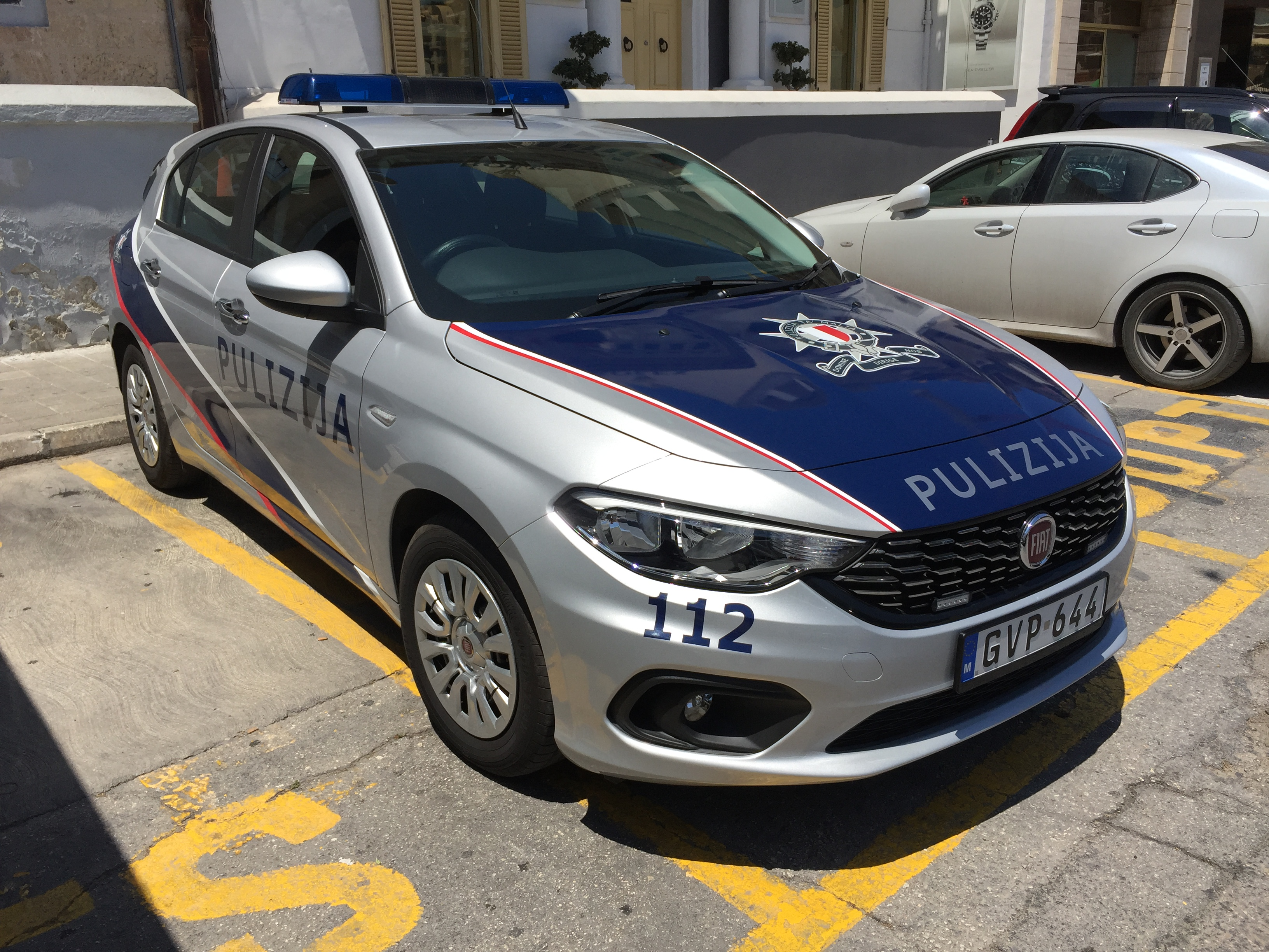 Fiat Tipo Pulizija (Malte)